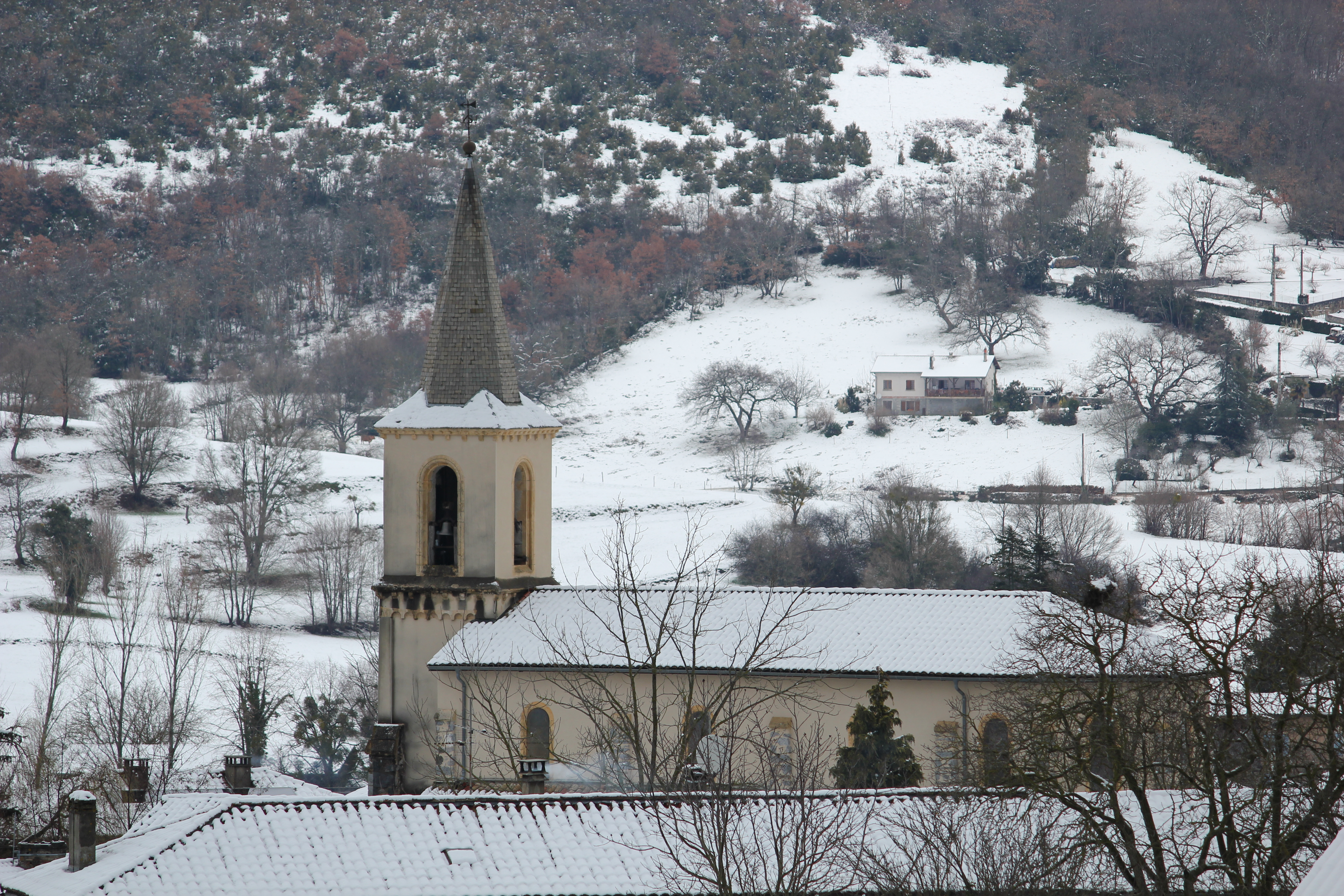 Urau (Haute-Garonne, Midi-Pyrénées, France) : L'église.